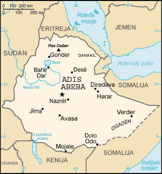 Zemljevid Etiopije.